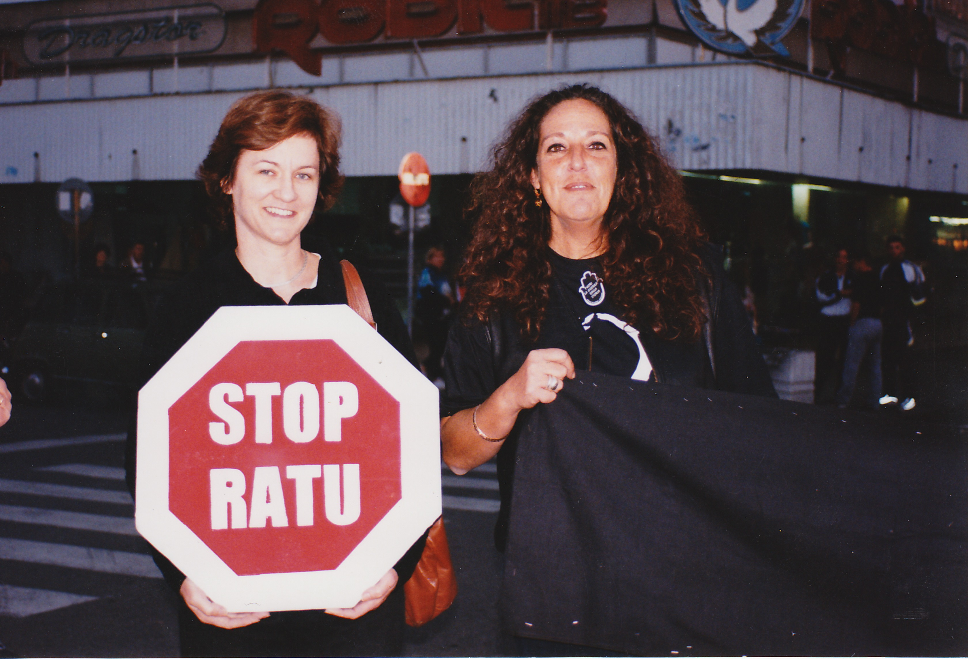 Hagar Rublev (derecha de la imagen) cofundadora del movimiento internacional Mujeres de Negro y Yolanda Rouiller con el cartel STOP RATU. IX Encuentro Internacional de Mujeres de Negro. Ulcinj, Montenegro. Octubre - 1999